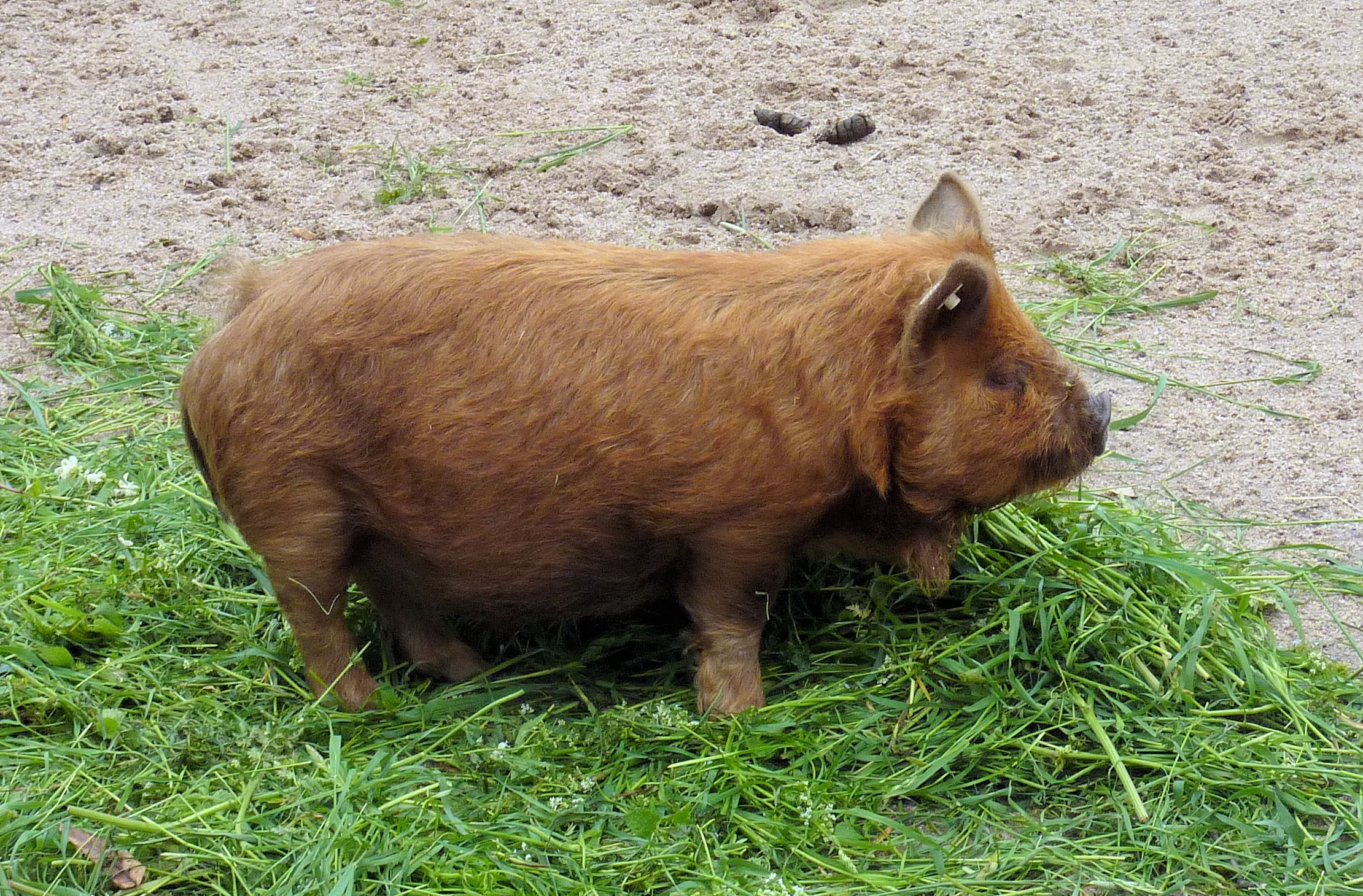 Kune Kune in der Wilhelma, Eberferkel der Eltern "Speck" und "Zwiebel"